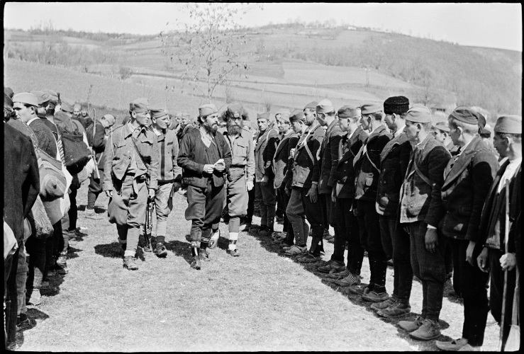 Са смотре Групе љубићких бригада у околини Чачка. Предраг Раковић и Радиша Чековић обилазе јединице 1943. године.